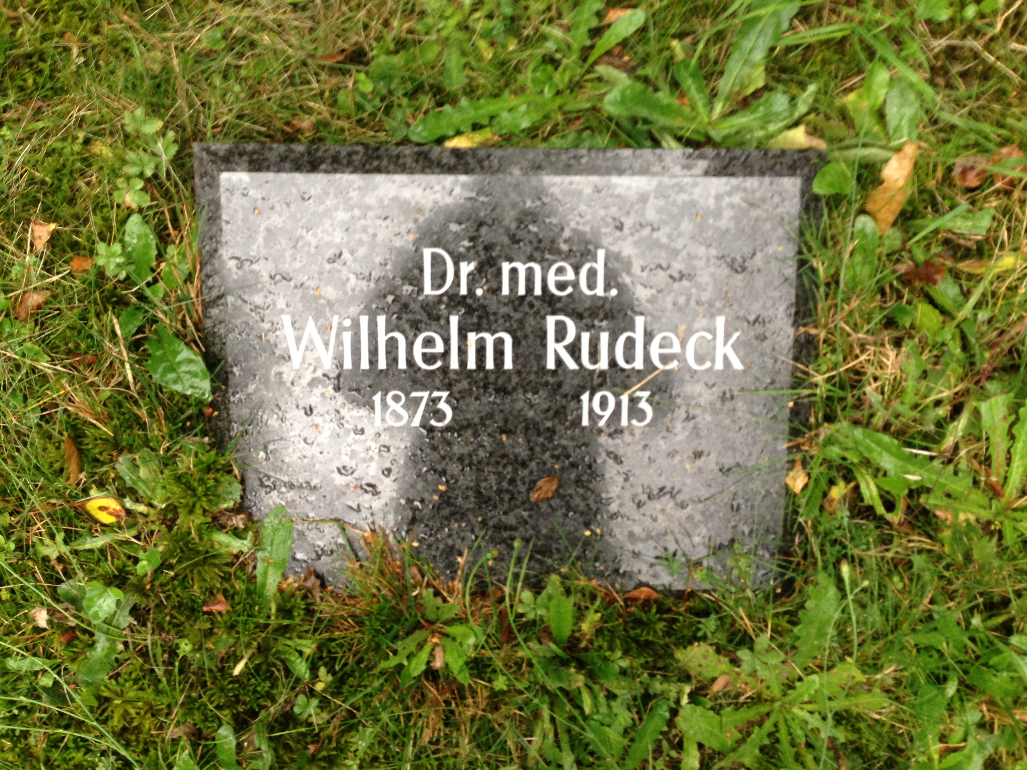 Grabmal und Grabplatte von Dr. med. Wilhelm Rudeck